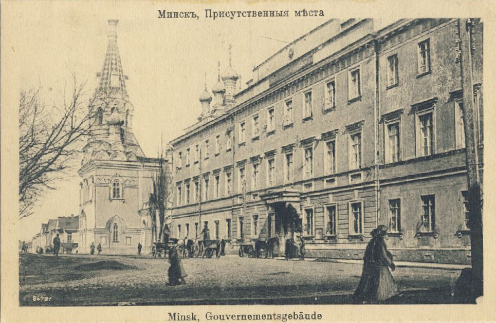 Беларуская (тарашкевіца): Менск (Miensk), рог пляцу Высокага Рынку (plac Vysoki Rynak) і вуліцы Валоцкай (vulica Vałockaja). Манастыр базылянаў, перабудаваны ўладамі Расейскай імпэрыі пад прысутныя месцы